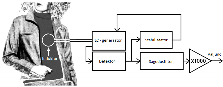 Foucault' kardiograafi põhimõtteline skeem.